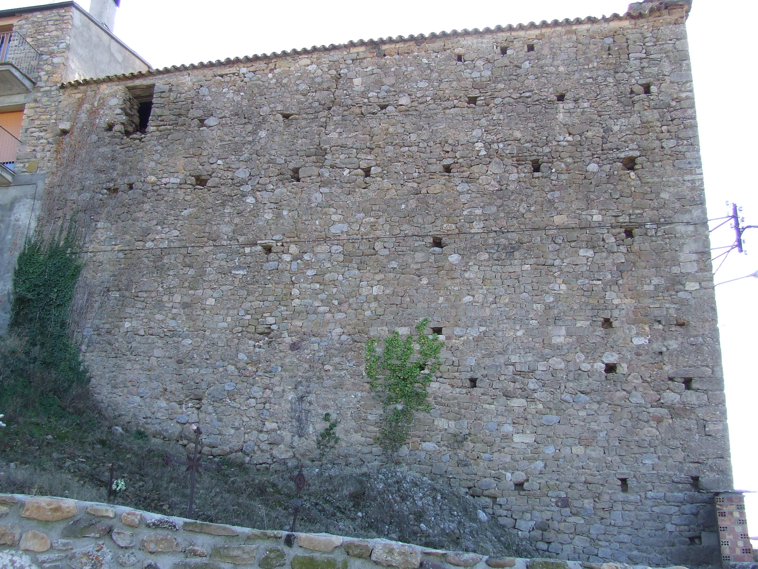 Església parroquial de Santa Margarida de Benavent de la Conca (Isona i Conca Dellà, Pallars Jussà). El mur septentrional